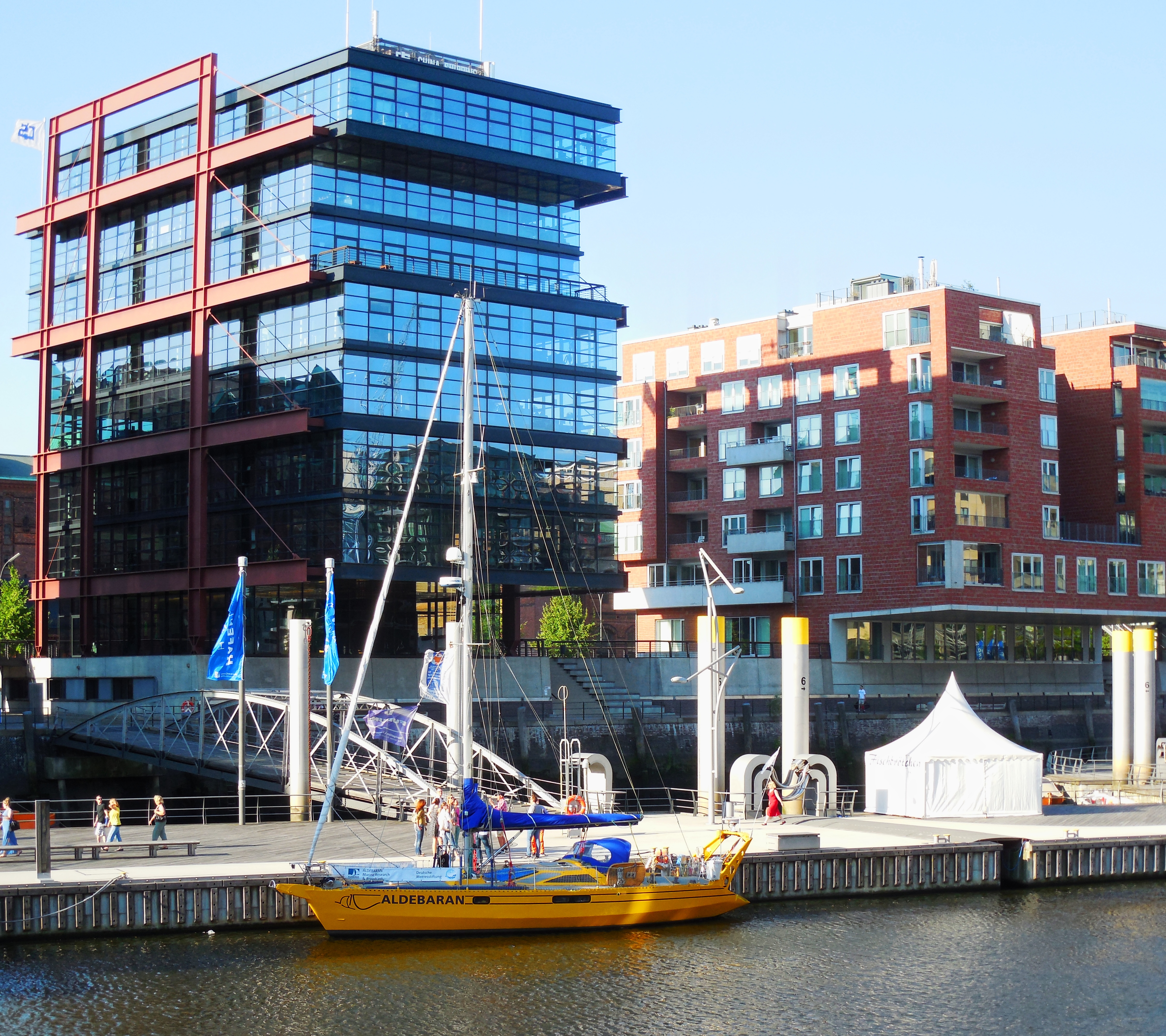 Am Sandtorkai / Dalmannkai, 20457 Hamburg, Germany